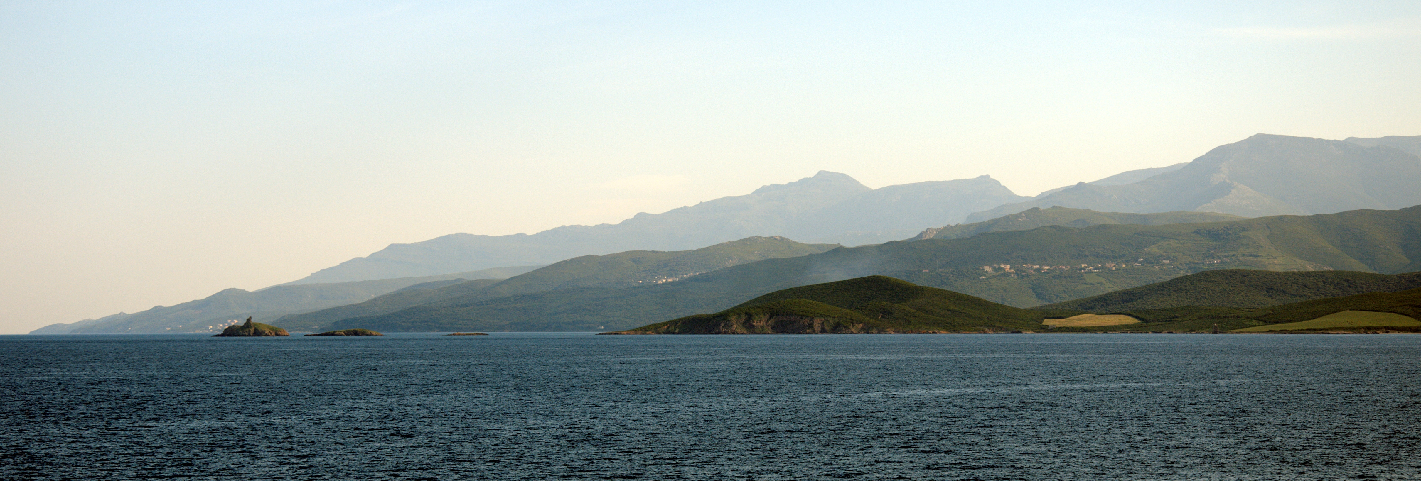 Cap Corse